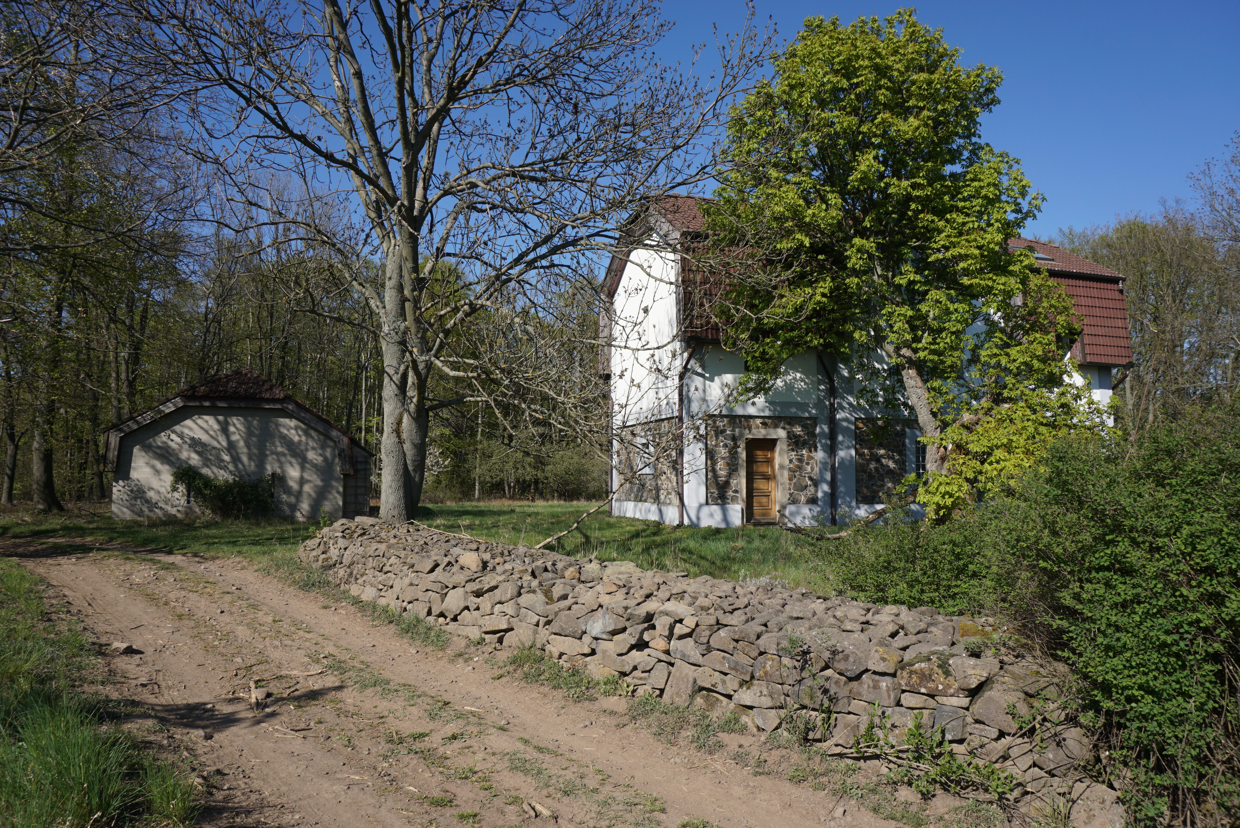 Novina (Neuland, obec Stvolínky) - dům čp. 5